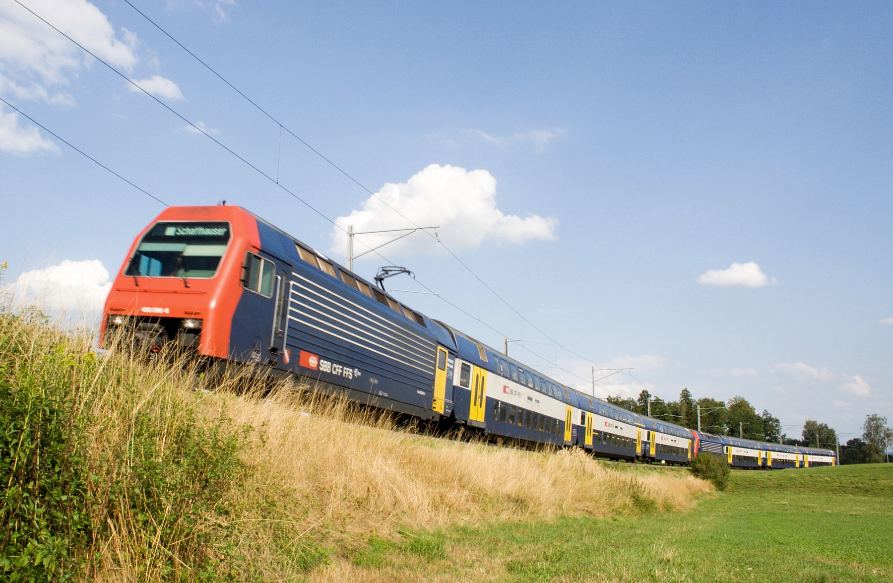 Zurich S-Bahn train near Andelfingen